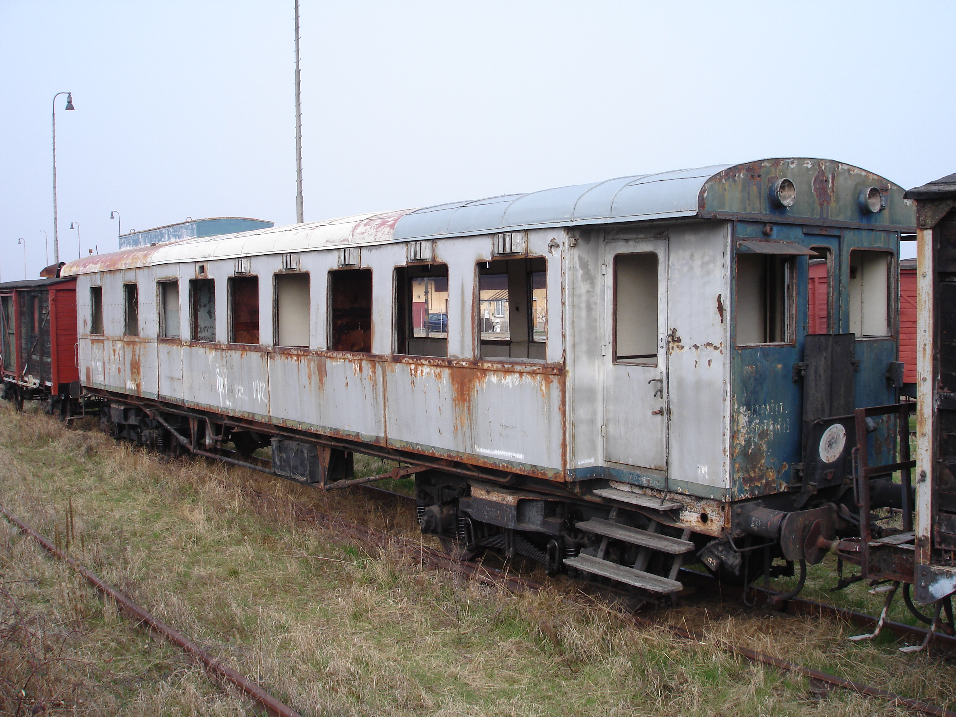 ehamaliger Dieseltriebwagen M 234.001 der ČSD im Eisenbahnmuseum Zlonice